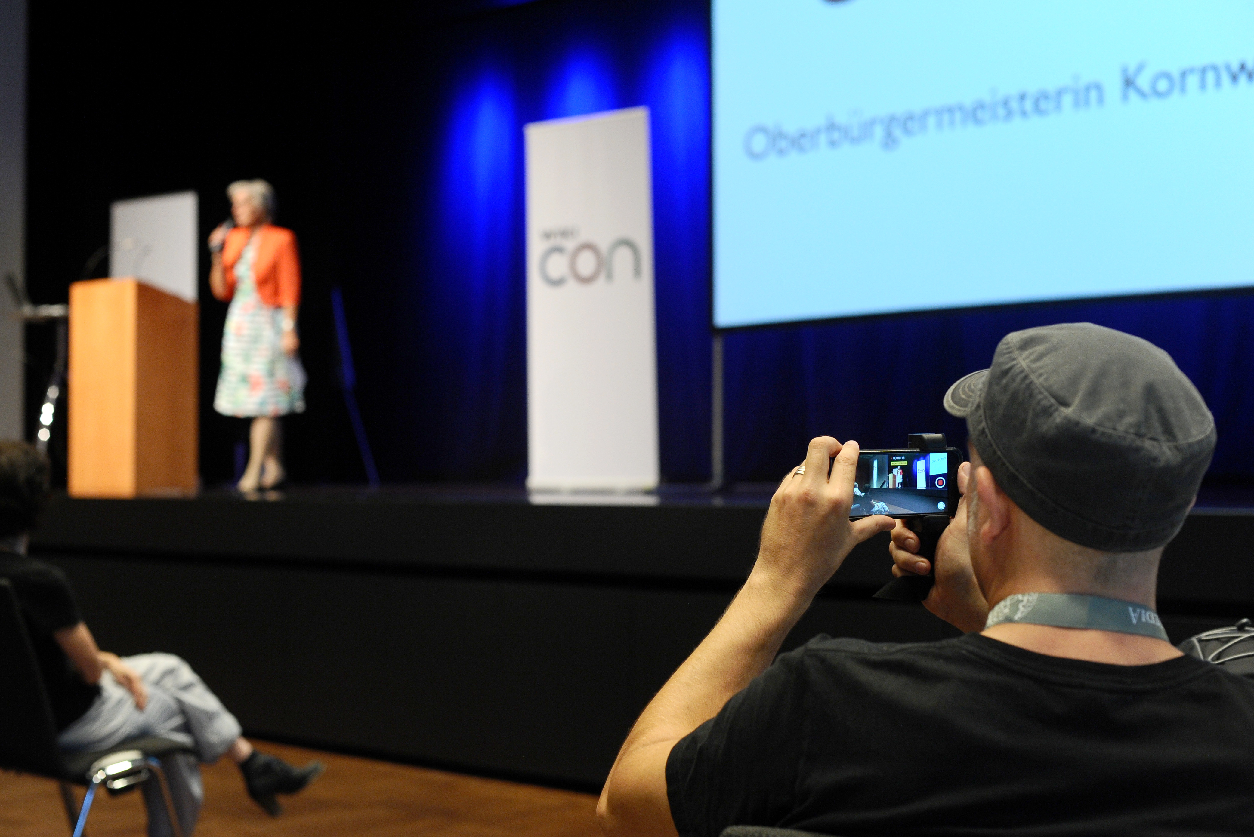 WikiCon Region Stuttgart - Eröffnungsfeier